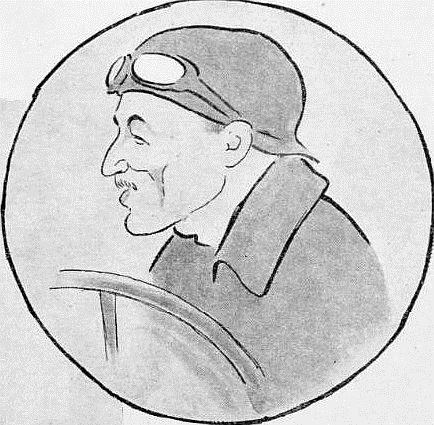 Caricature de Jules Goux, après sa troisième place lors de l'Indy 500 de 1919.